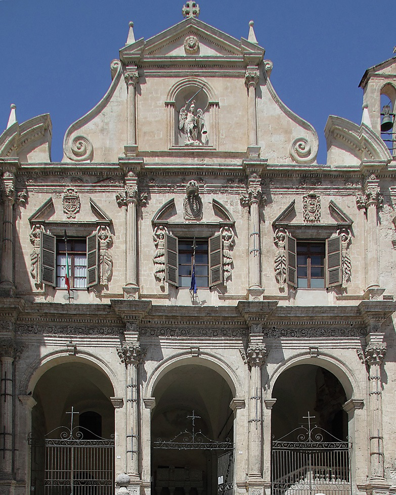 Facciata chiesa di S. Michele. Sono visibili i tre stemmi e la statua dell'arcangelo patrono